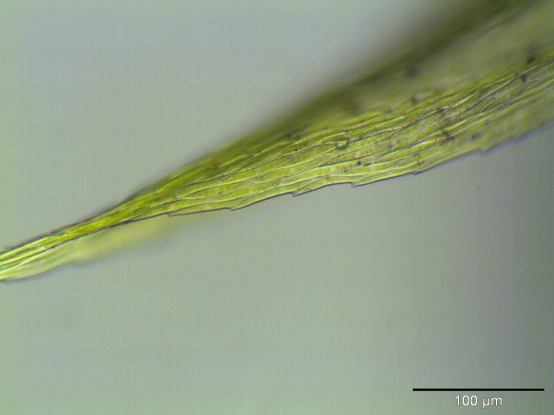 Seidenmoos (Homalothecium sericeum), gesägte Blattspitze, 250x vergrößert